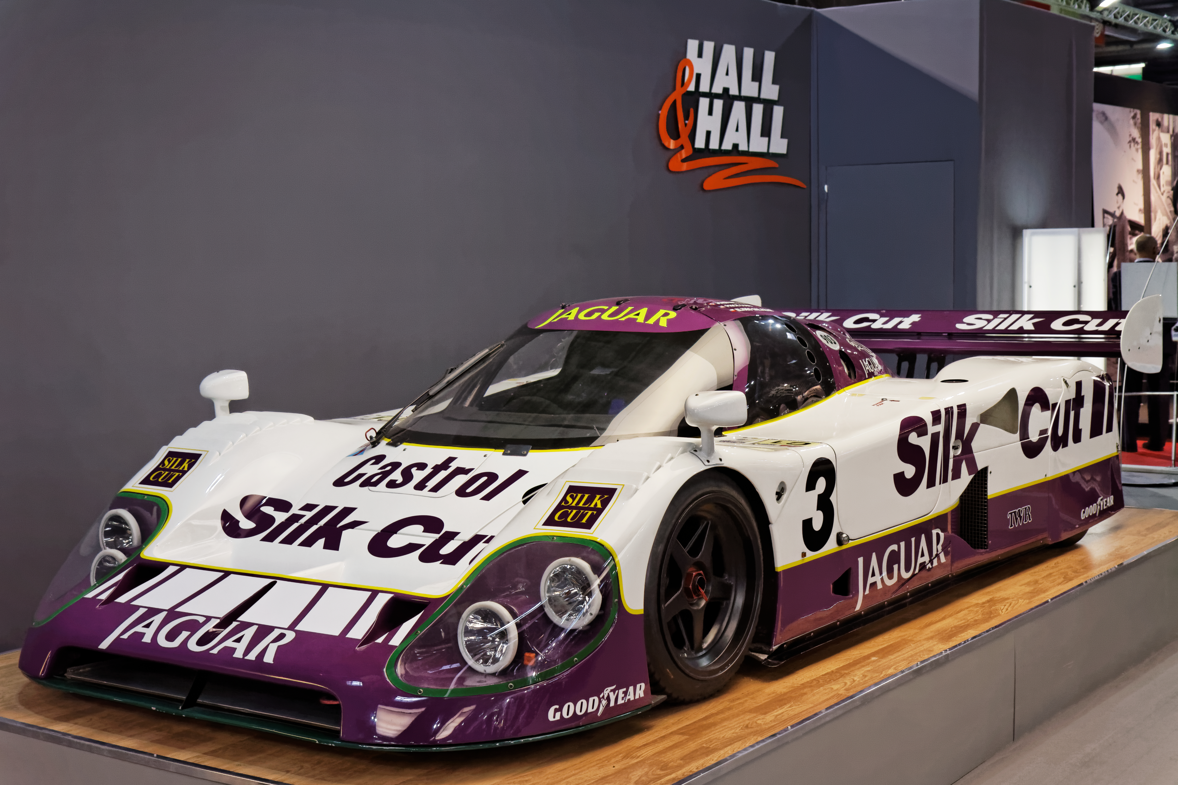 Une Jaguar XJR12 présentée lors du salon Retromobile 2013.